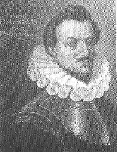 Geportretteerde overleed in 1638. Zie hier. Bild:Emanuelvanportugal.jpg